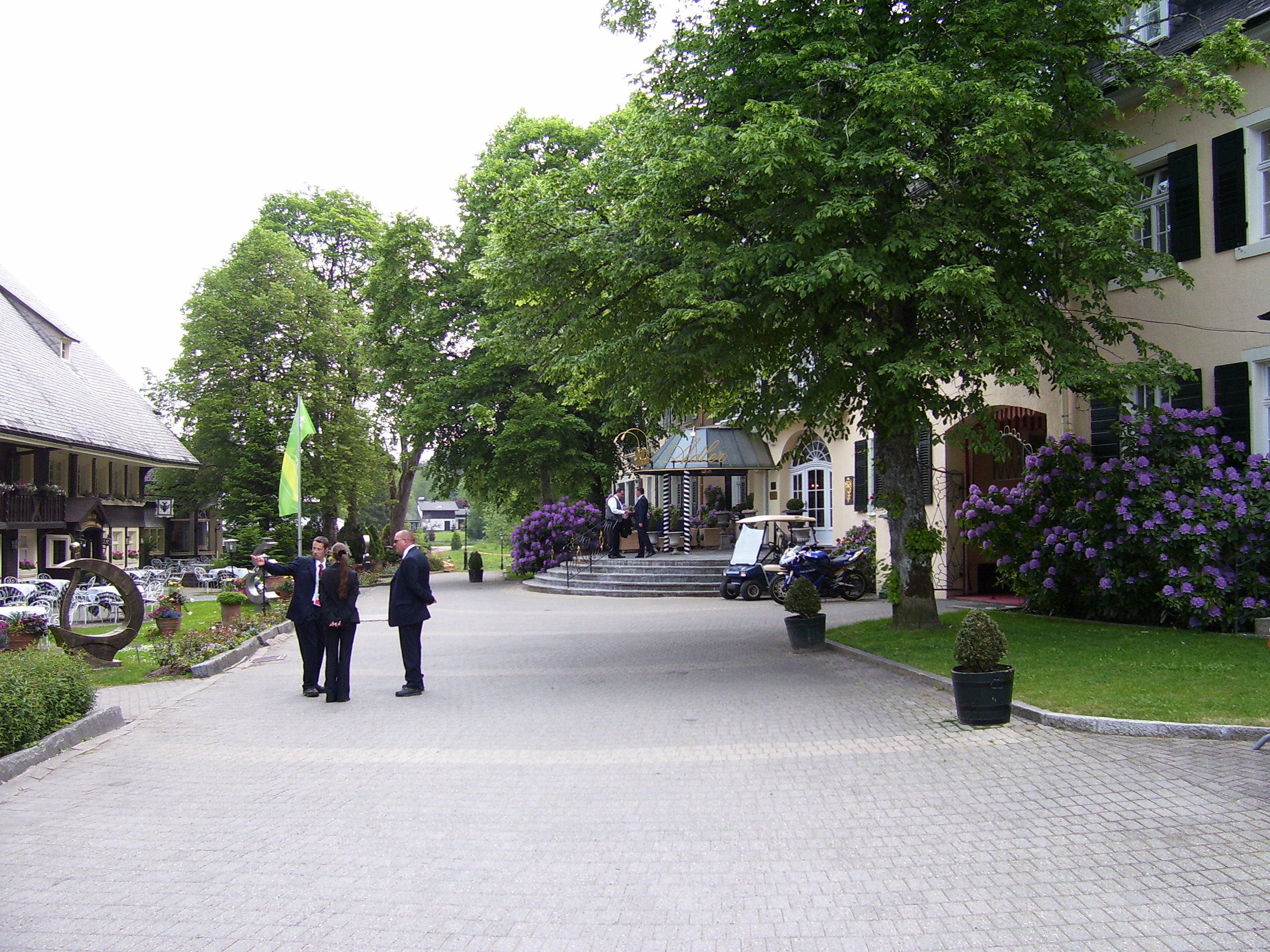 Eigen foto, gemaakt in juni 2006